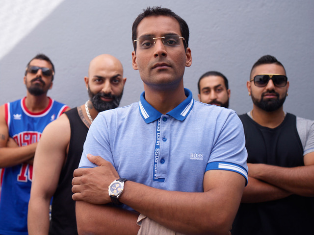 Farrakh Abbas i Gjengangere